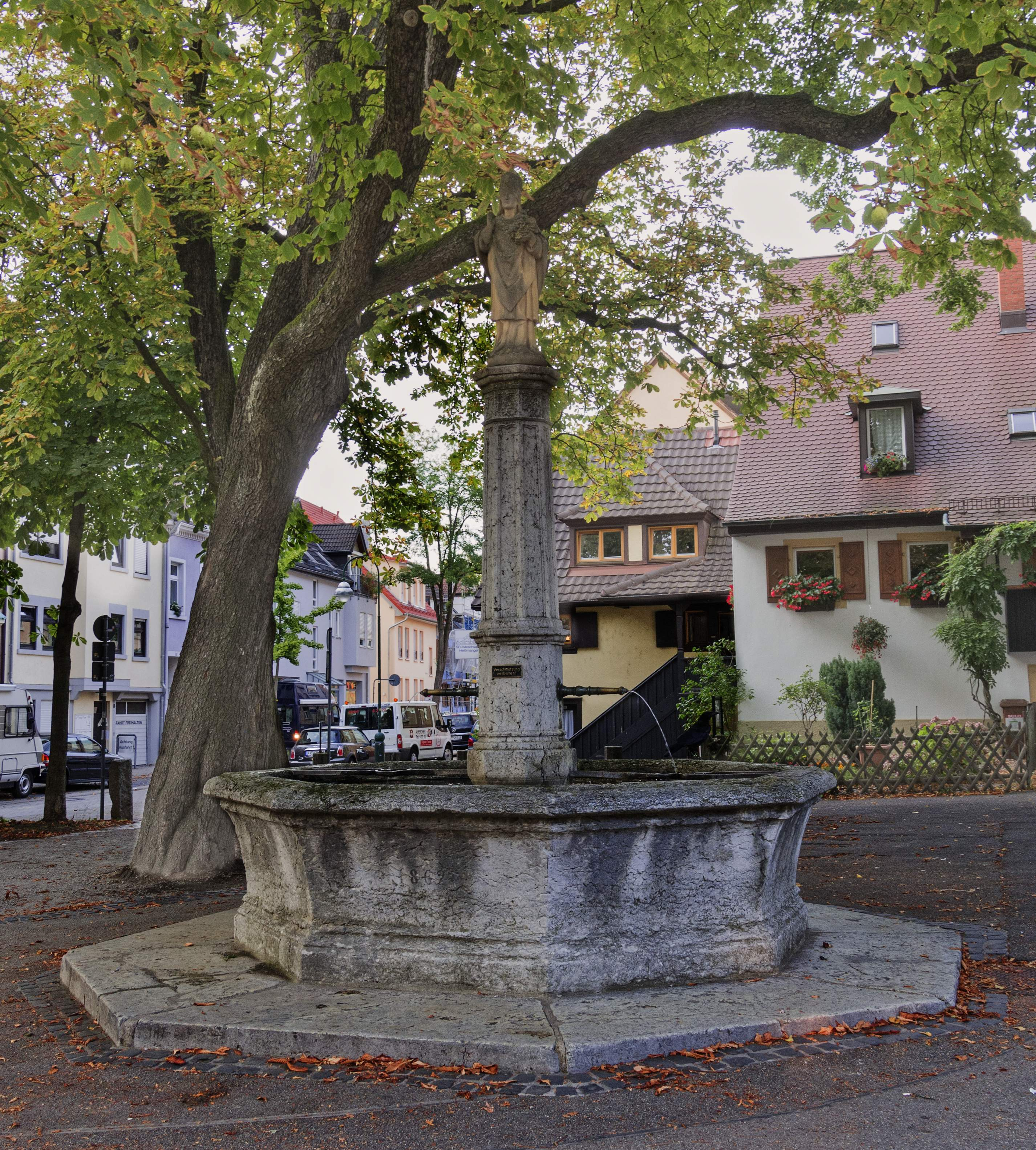 Bilder aus Freiburg